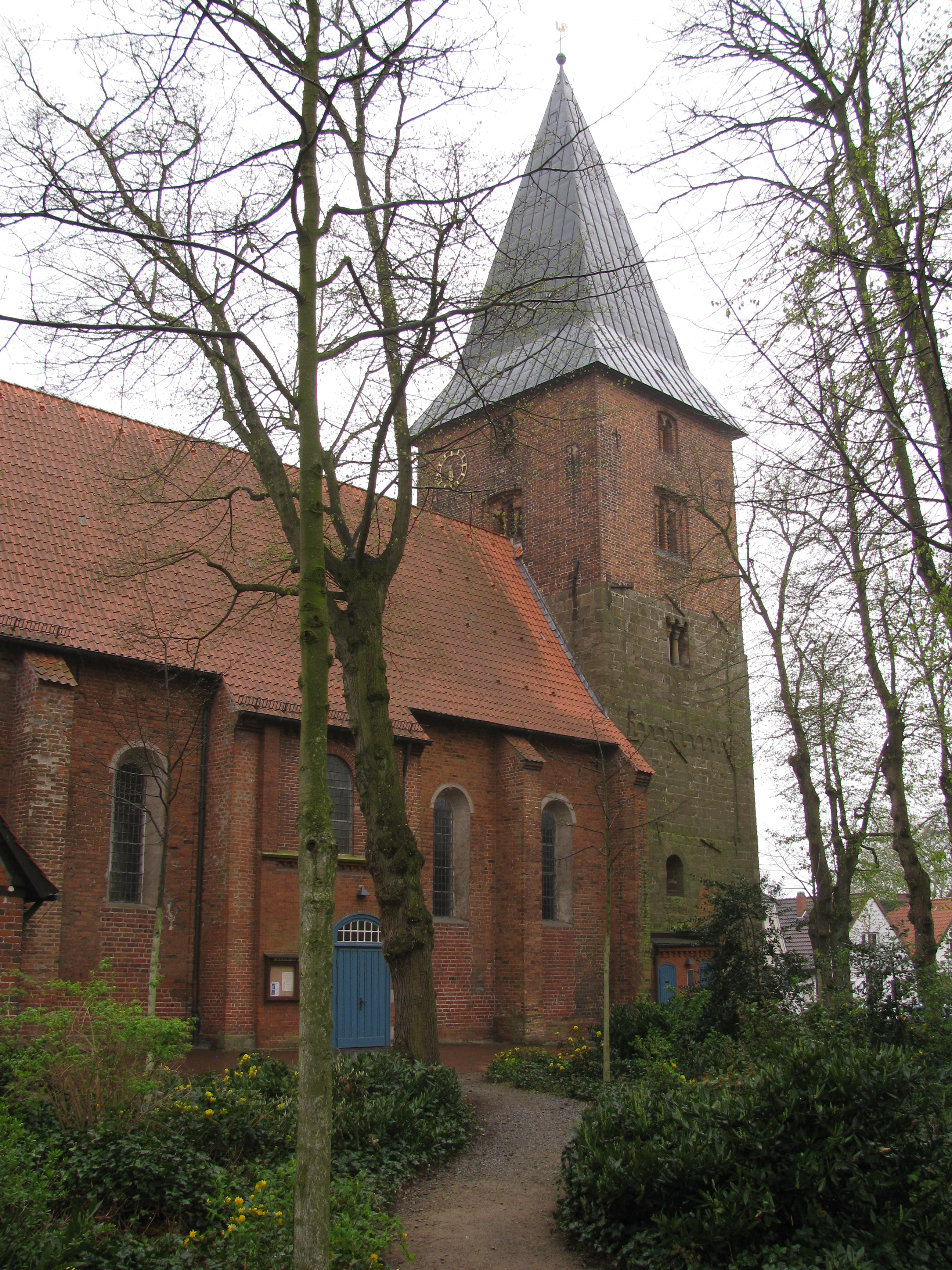 Die St. Andreaskirche in Verden (in Niedersachsen) wurde um 1200 aus Backstein erbaut. Es handelt sich um eine einschiffige Kirche mit spätromanischen Bauformen.